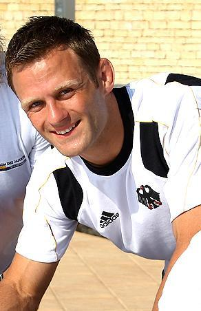 Ole Bischof